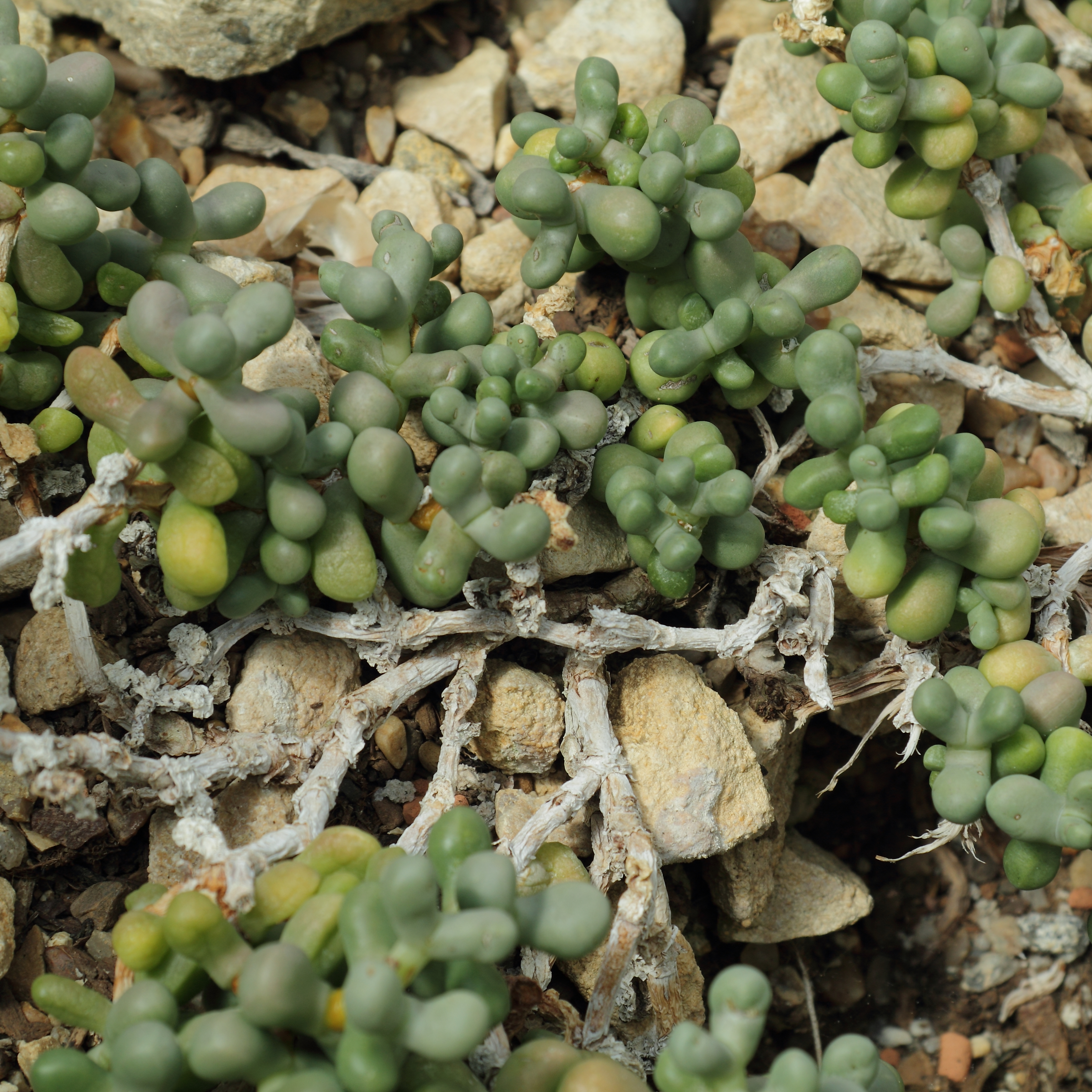 Jensenobotrya lossowiana, identifierad med hjälp av befintlig skylt vid Kew Gardens, London.